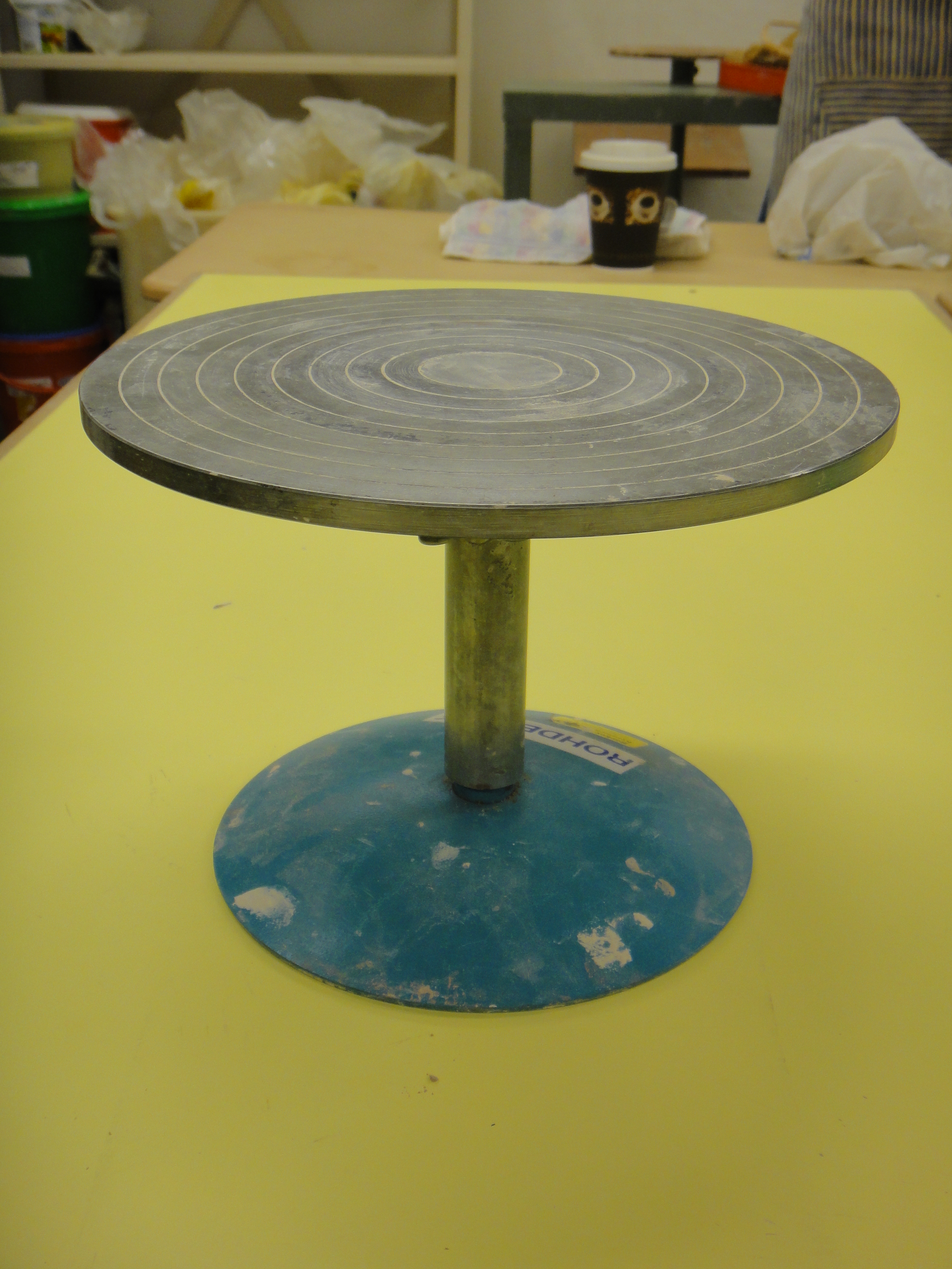 Ränderscheibe, Hilfsmittel zur Anfertigung von Keramik